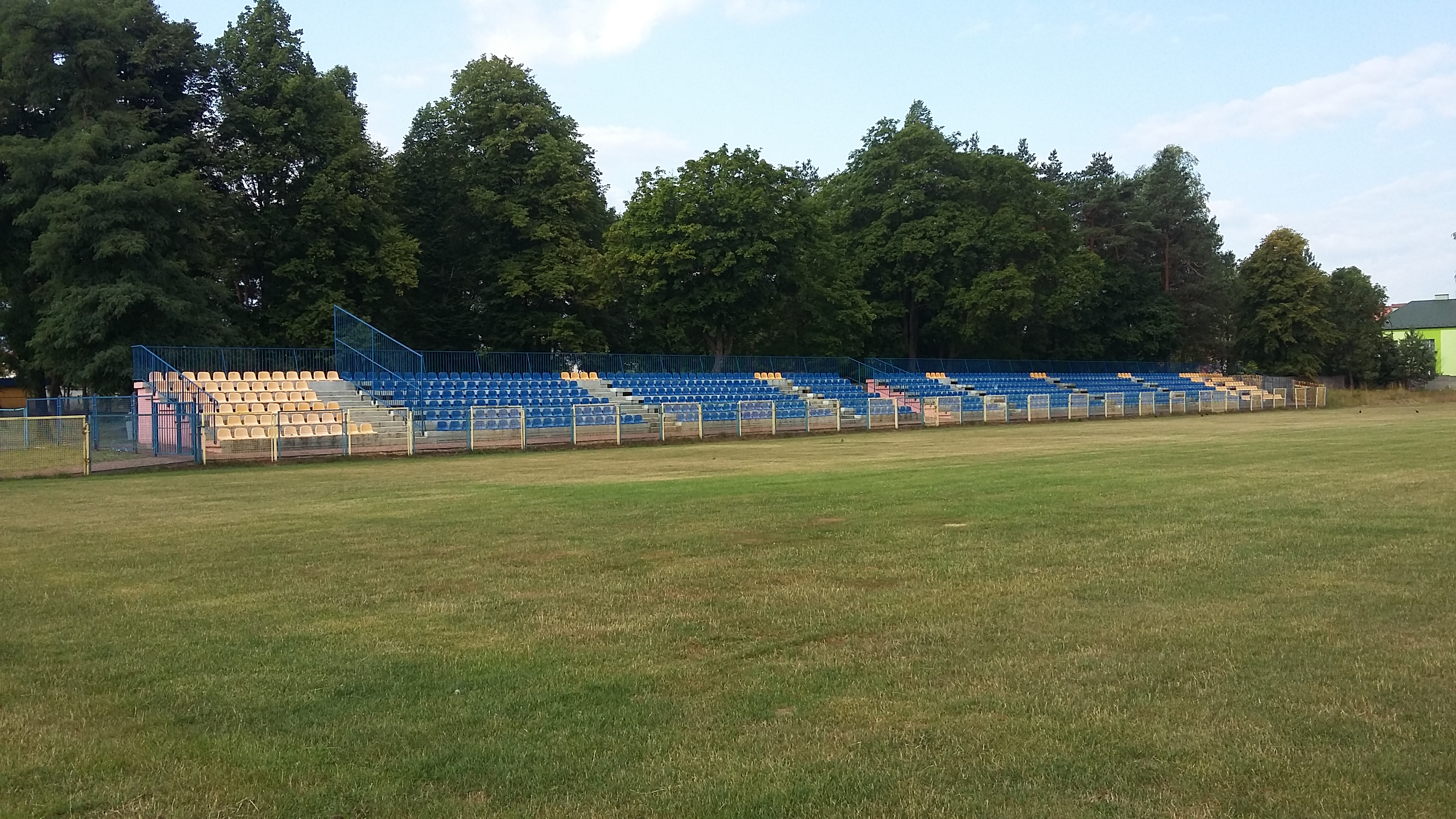 Trybuna Stadionu w Stąporkowie